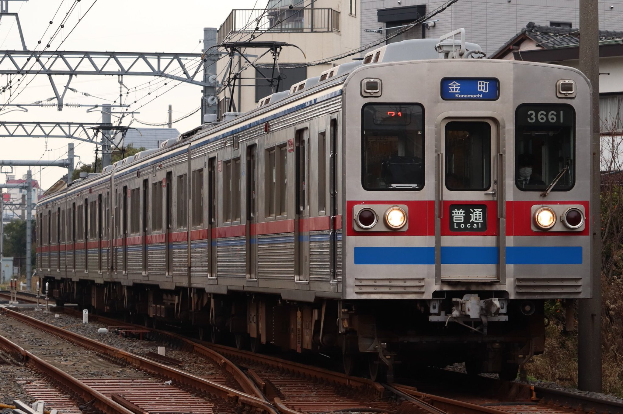 京成金町線を走る京成3600形